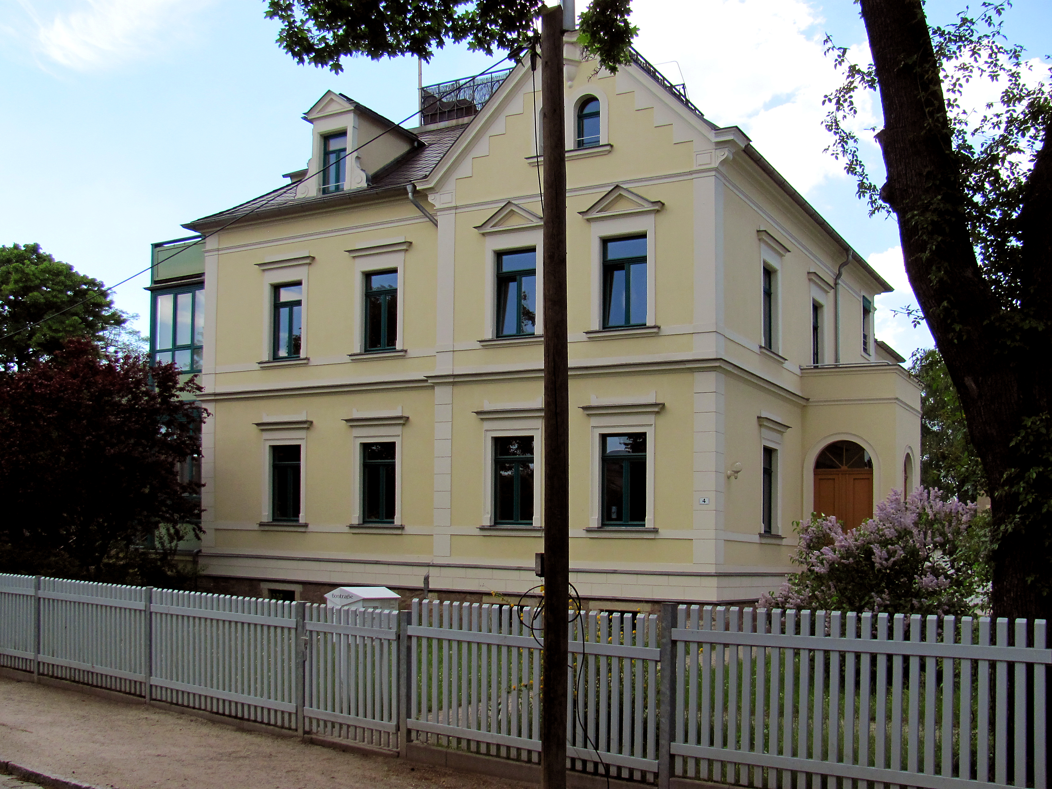 Radebeul-Niederlößnitz, Mietvilla Heinrich Gerhardt